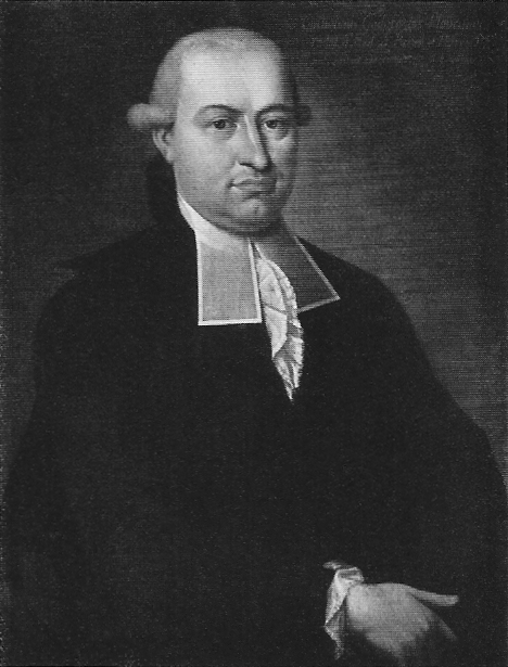 Professor Wilhelm Gottfried Plouquet